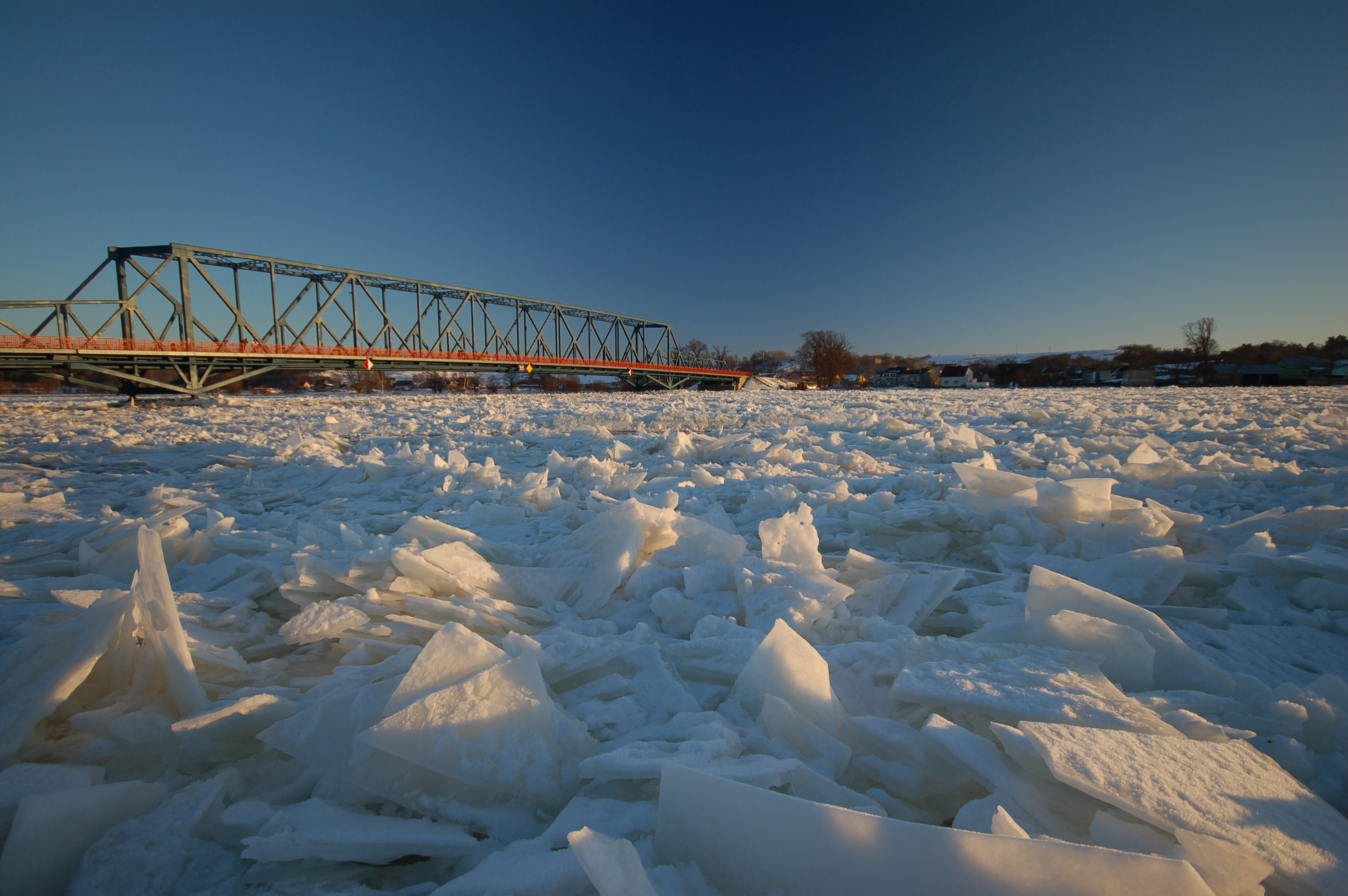 Schwedt; Flussbett der Oder mit Eisgang bei Krajnik Dolny